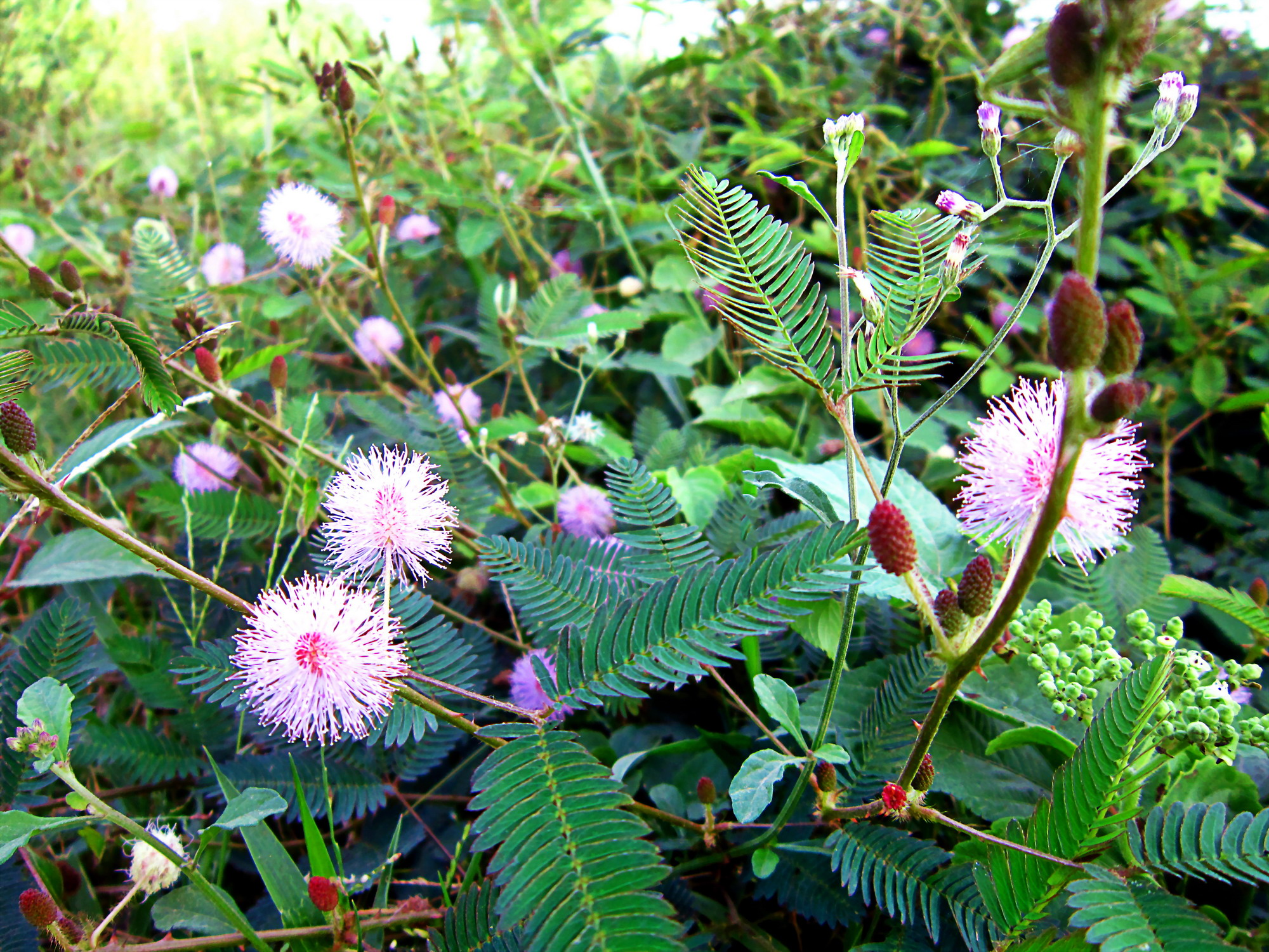 Cây mắc cỡ còn gọi là cỏ trinh nữ ở miền Nam Việt Nam.